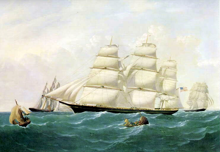 Built 1851, Hoboken, N. J., 1680 tons.